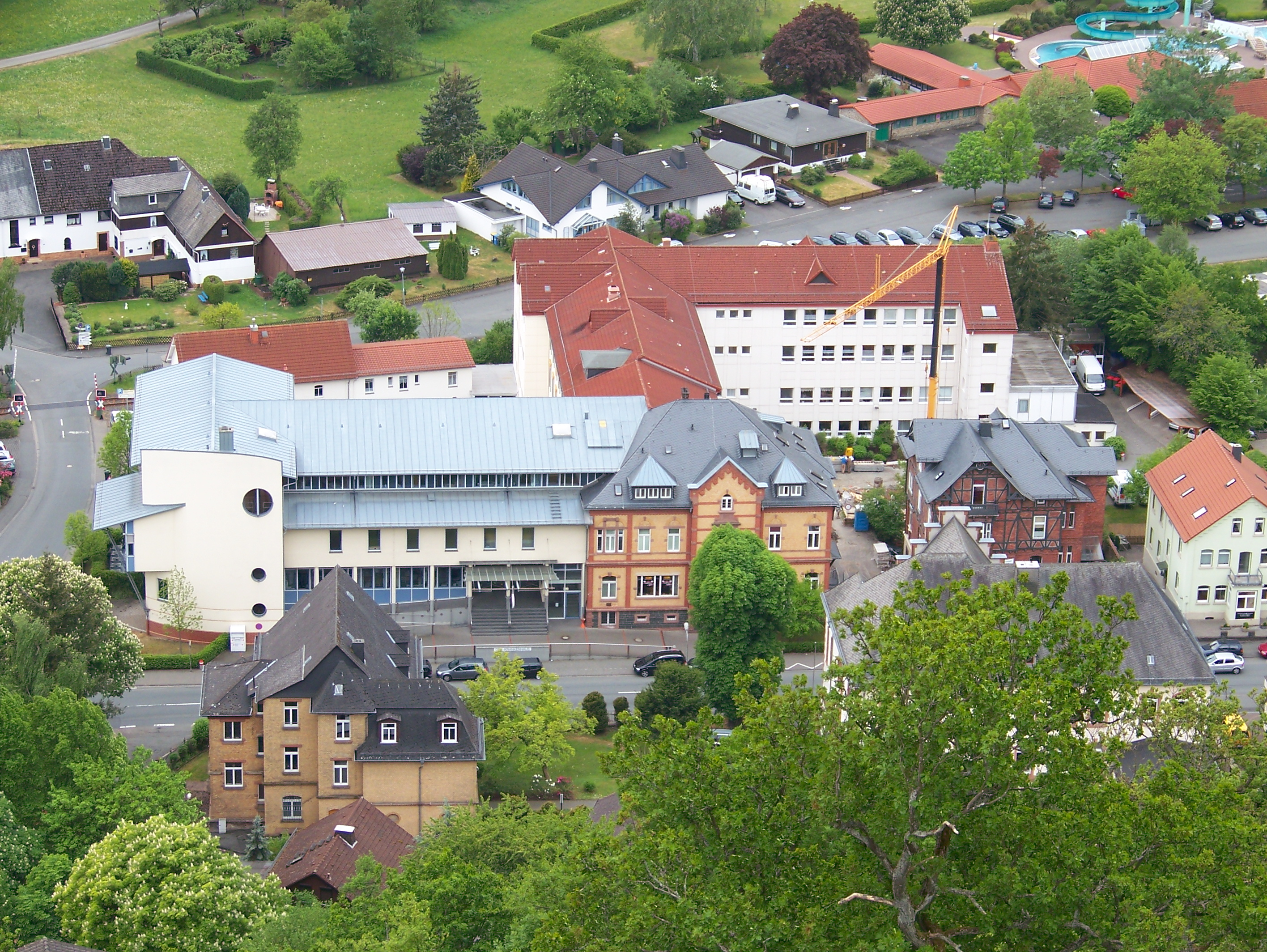 Krankenhaus des DRK in Biedenkopf, Hessen. Der Altbau in der Bildmitte wurde von 1897 bis 1925 als Landratsamt genutzt, von 1925 bis 1943 als Erholungsheim für Mitglieder von Sanitätskolonnen; 1944/1945: Lazarett. Ab 1946 begann die Nutzung als Krankenhaus.